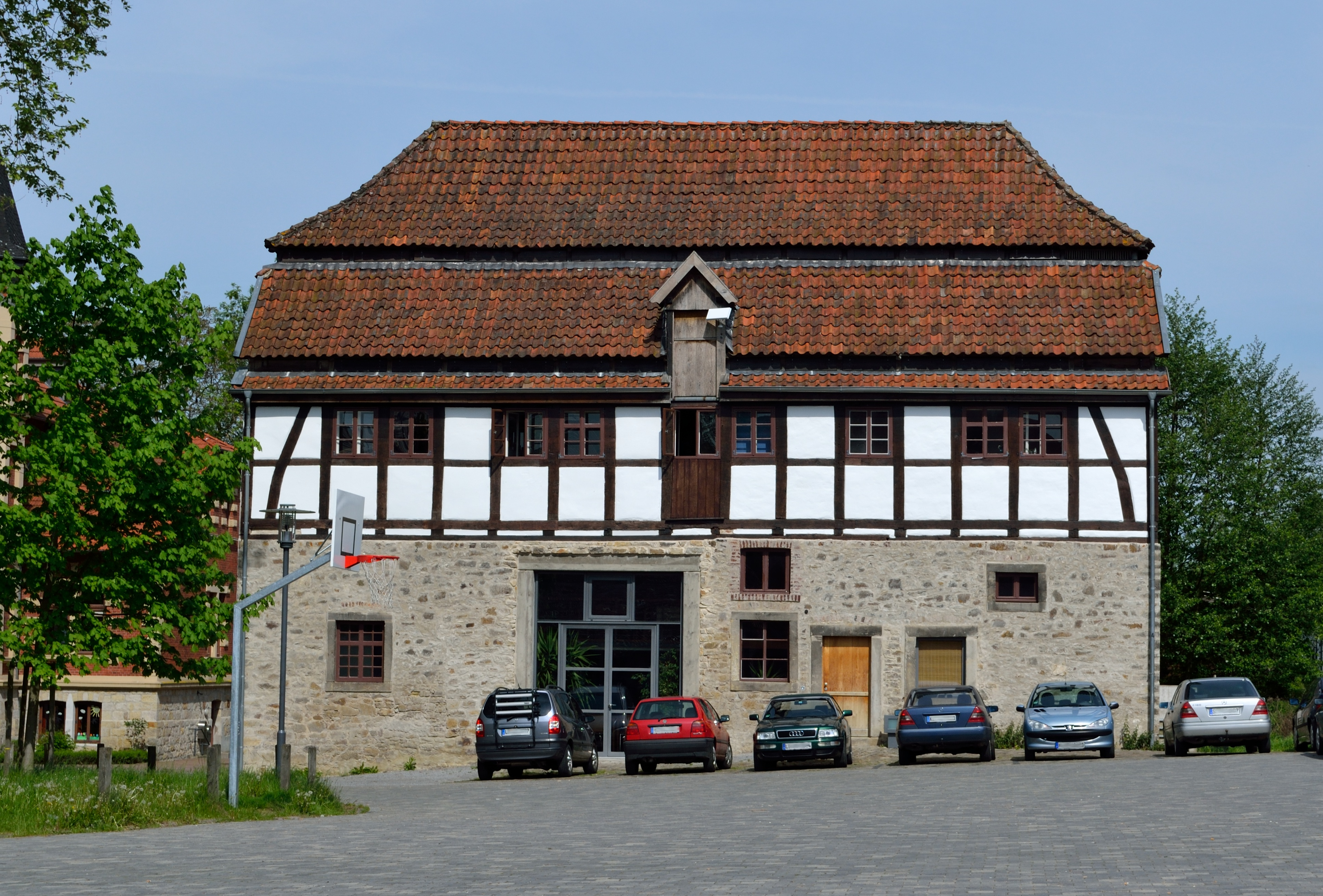 Gut Herberhausen, Objekt 1: Speicher This is a photograph of an architectural monument.